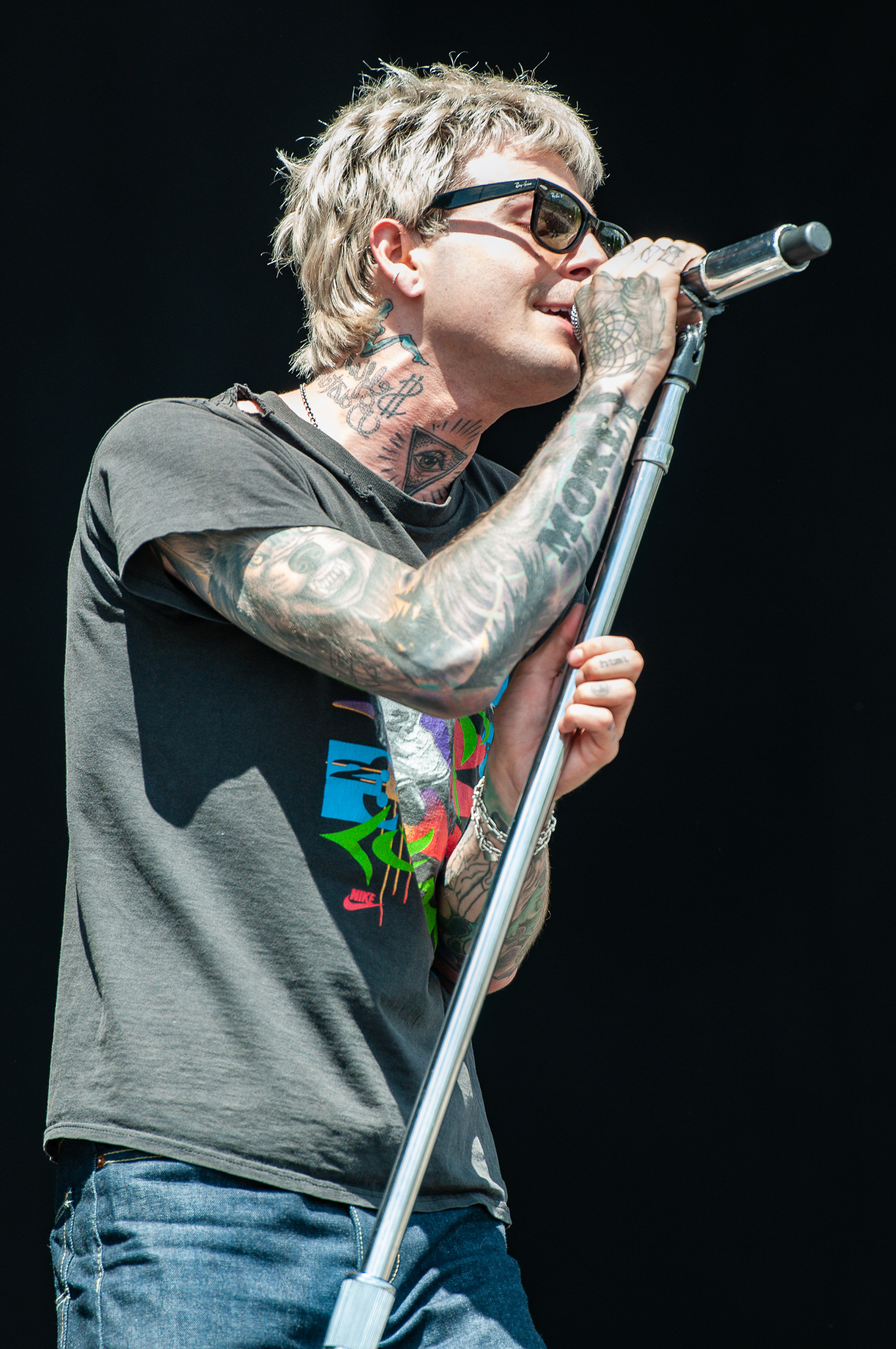 ARGO-Konzerte,Festival,Jesse Rutherford,Konzert,Livekonzert,Livemusik,Musik,RiP,Rock im Park 2018,The Neighbourhood,Zeppelin Stage